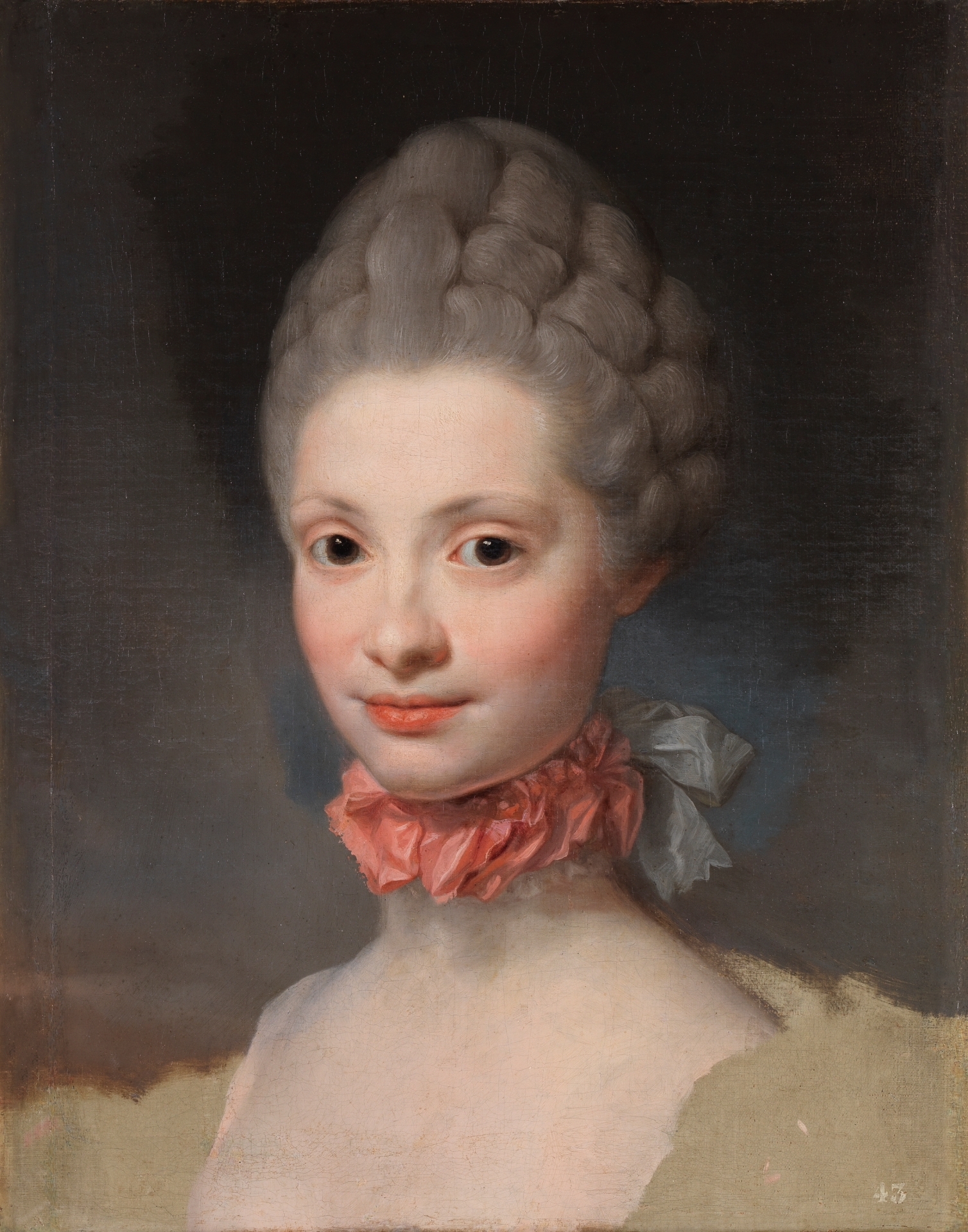 Retrato de la princesa de Asturias María Luisa de Parma (1751-1819), que llegaría a ser reina consorte de España por su matrimonio con el rey Carlos IV de España.